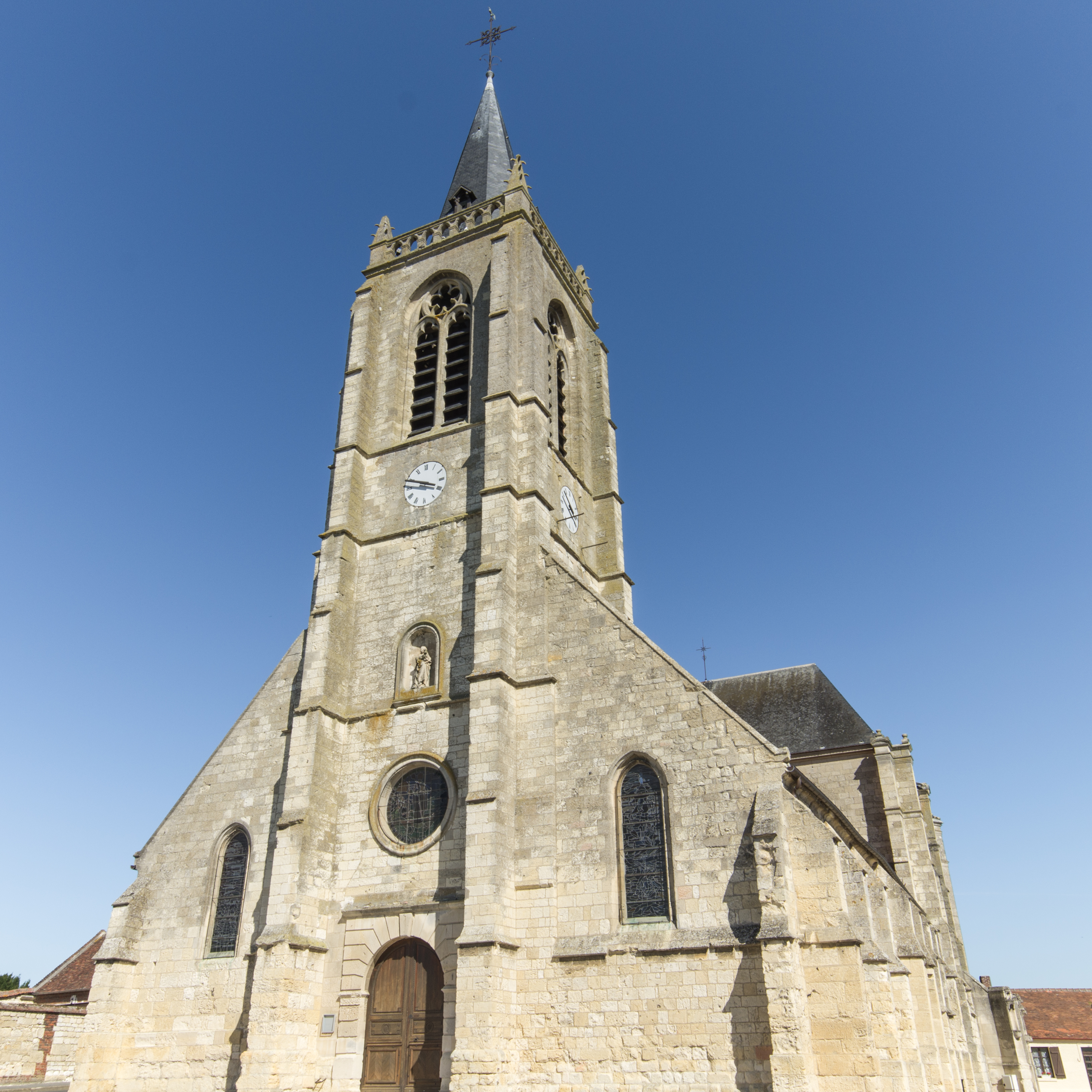 Église Saint-Denis de Remy - façade occidentale et clocher. .